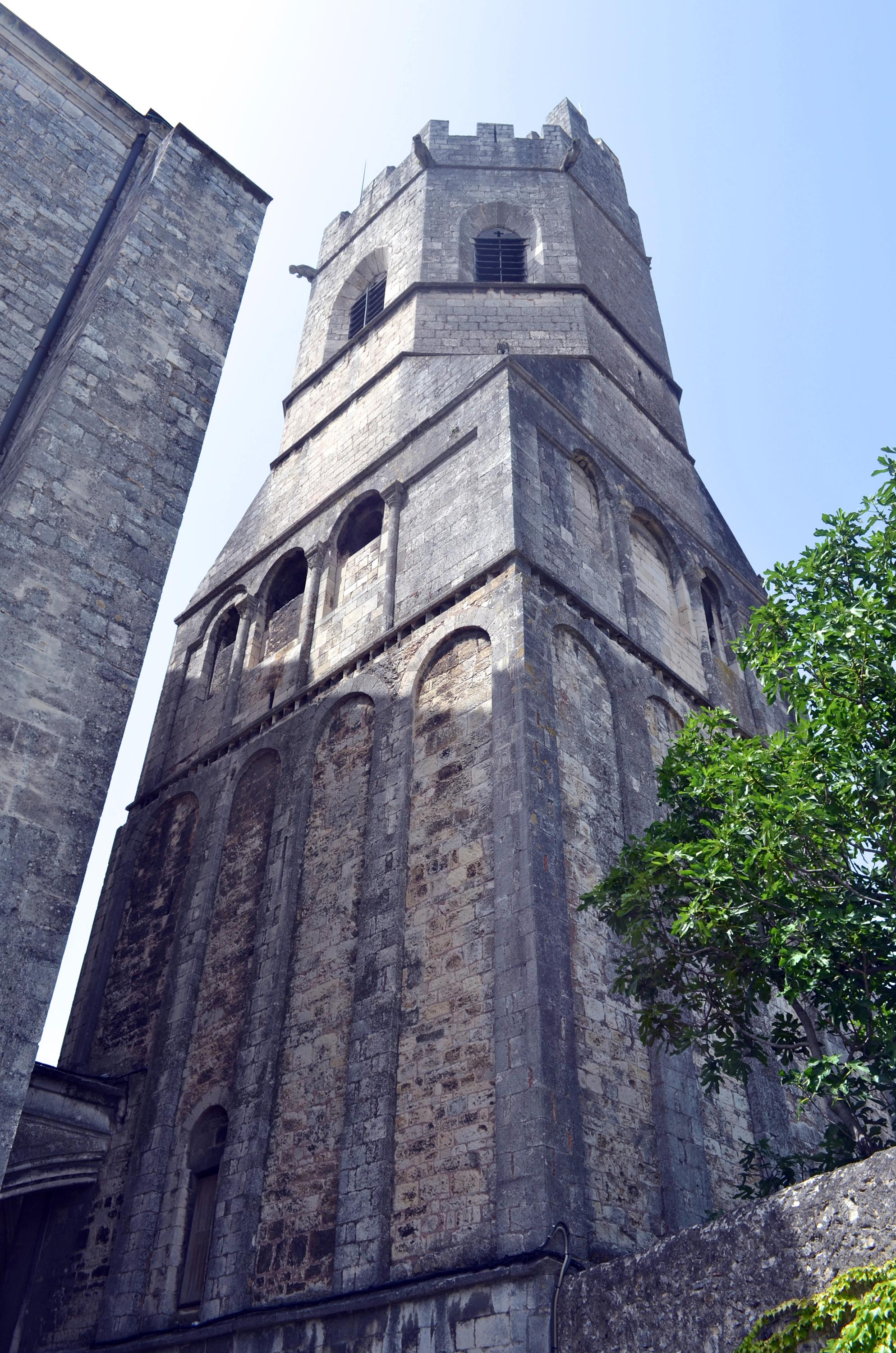 Cathédrale Saint-Vincent de Viviers (Ardèche), le clocher-campanile, ou tour Saint-Michel.